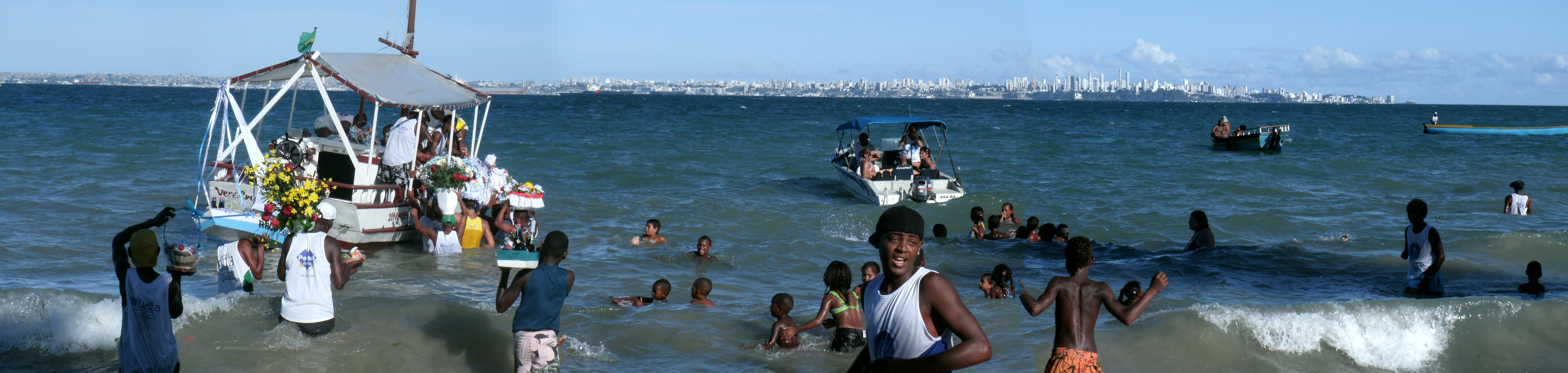 Fête de Lemanjá à Santa Cryz île d'Itaparica, embarcation des offrandes.